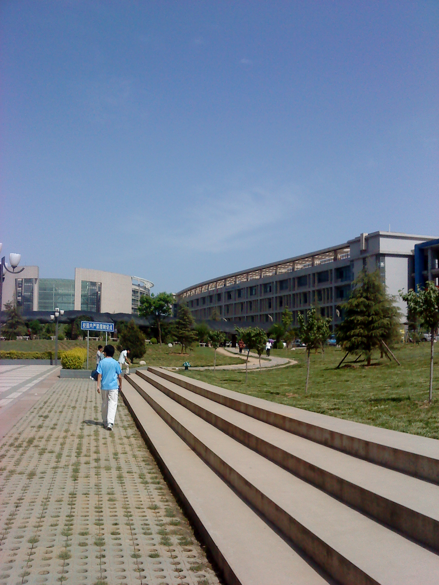 西外长安校区一角